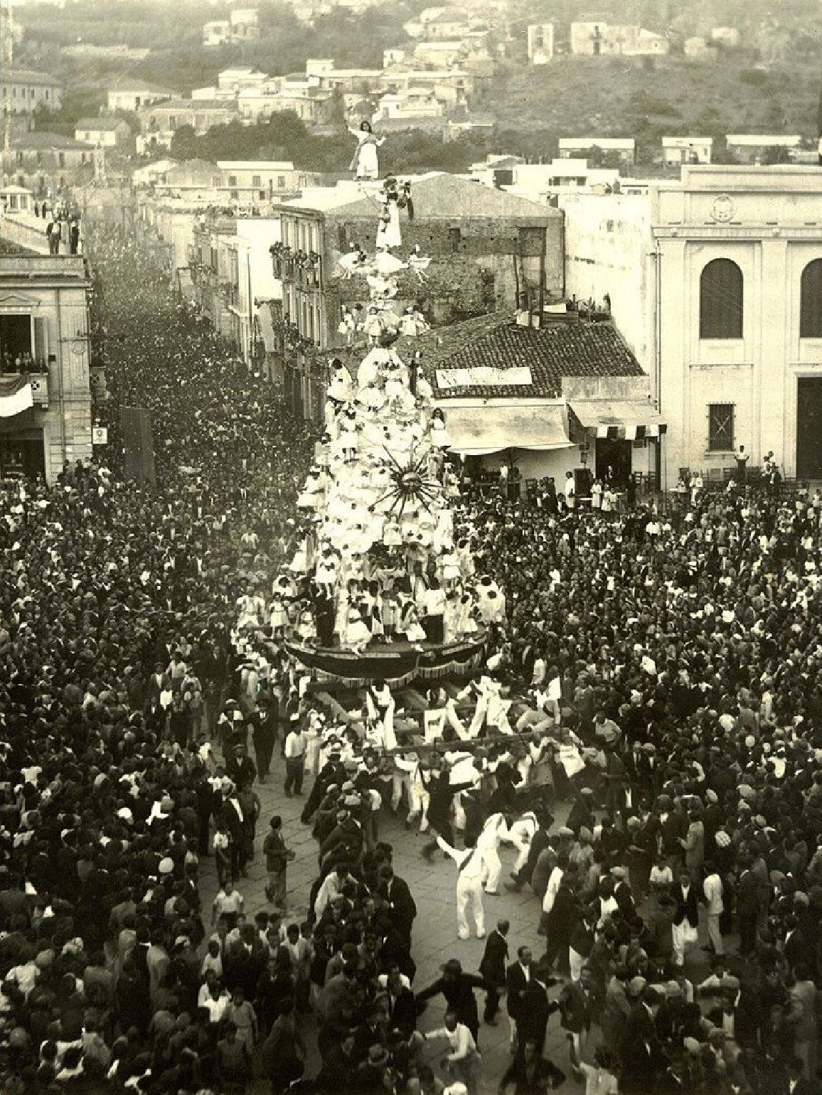 Palmi. Festa della Varia di Palmi del 28 agosto 1938